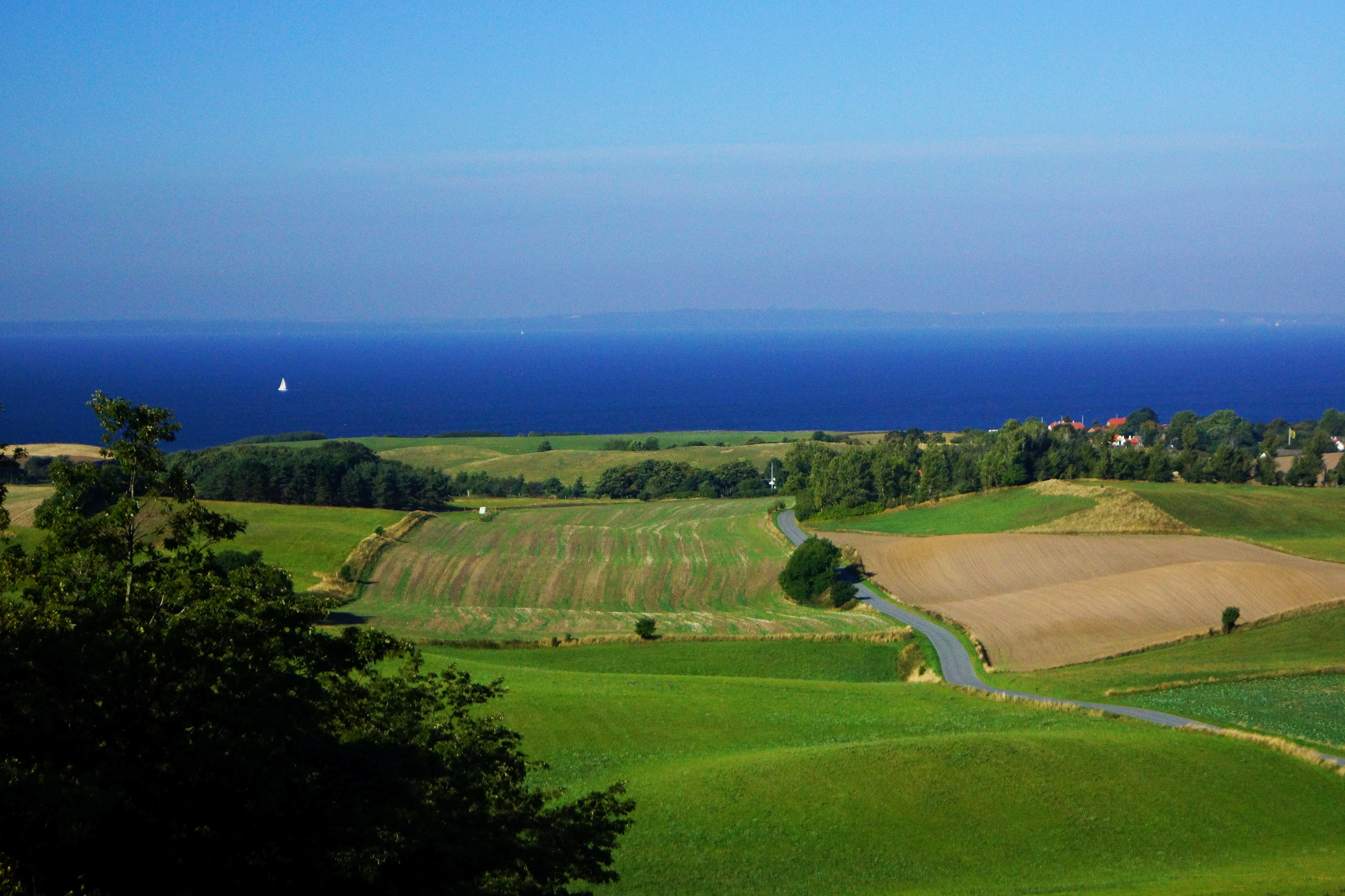 Fra Ellemandsbjerg